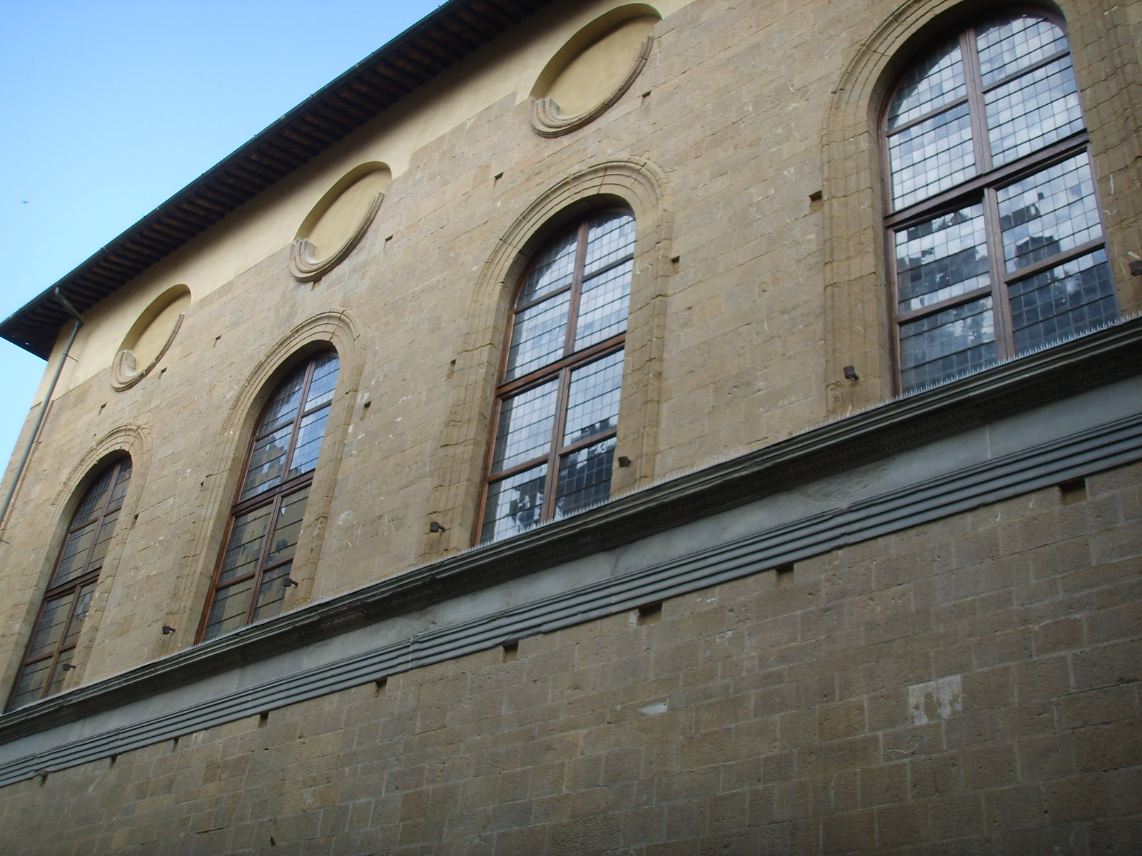 Palagio di parte guefa, retro